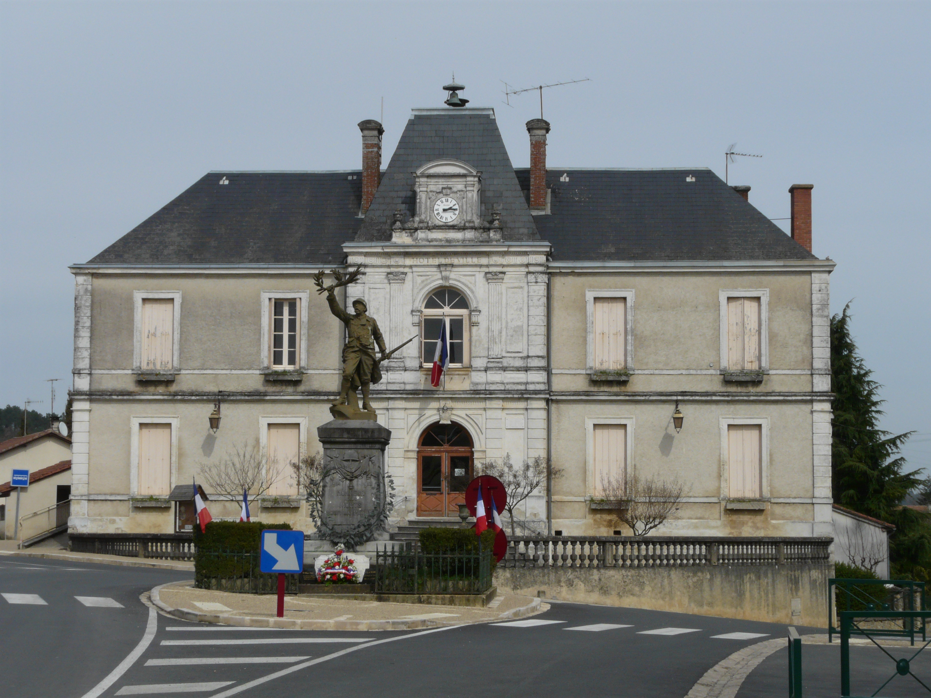 La mairie de Villamblard, Dordogne, France.